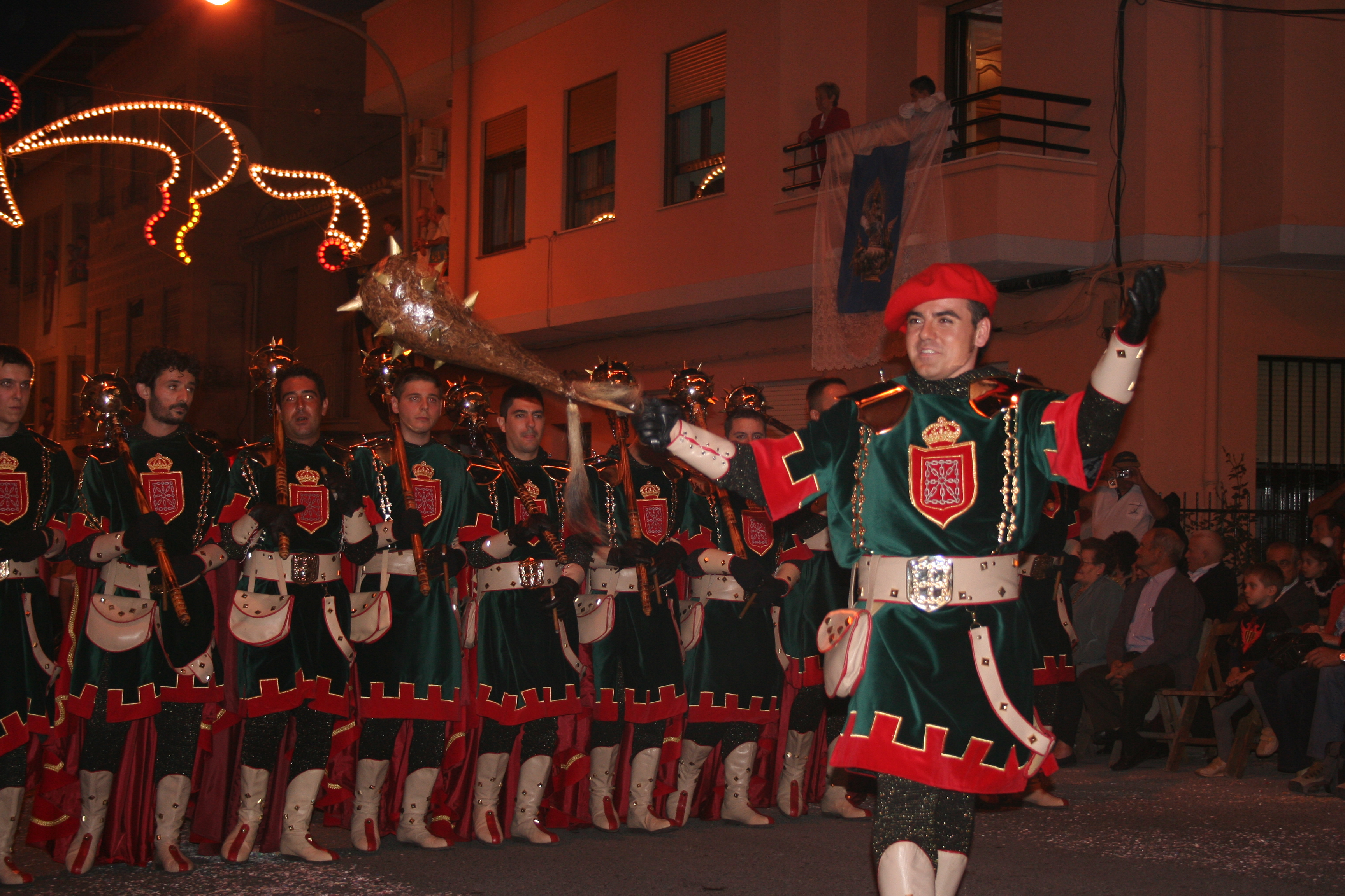 Fiesta de Moros Y cristianos en el municipio de Callosa de Ensarrià, Alicante.